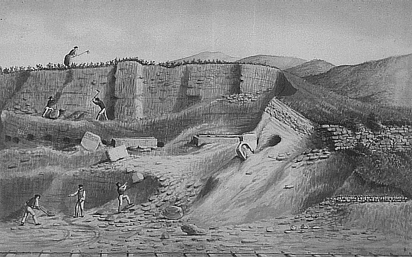 Bild vom Bau der Nahetalbahn unterhalb des Rupertsbergs